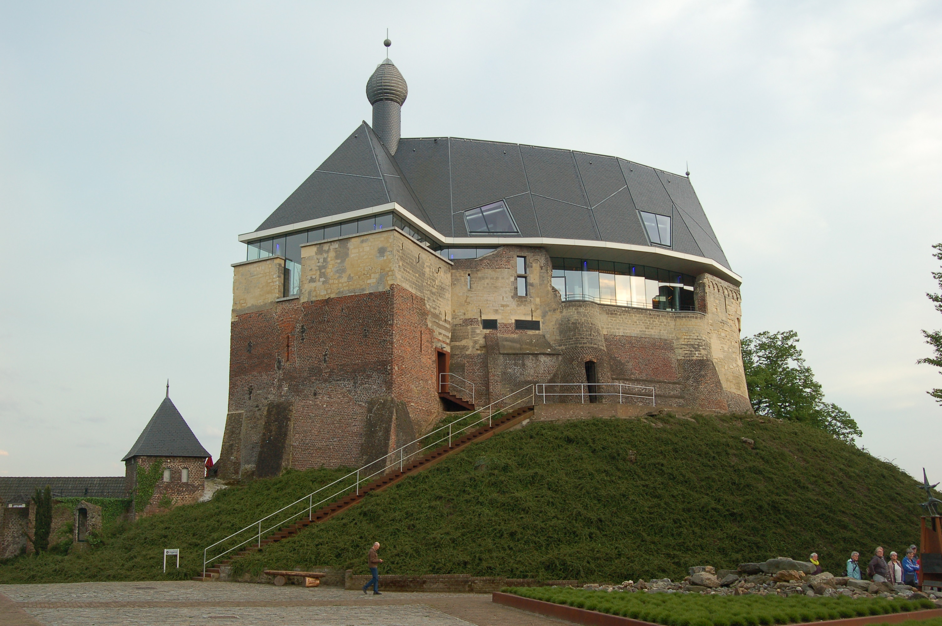 Kasteel Keverberg te Kessel na de verbouwing van 2015.